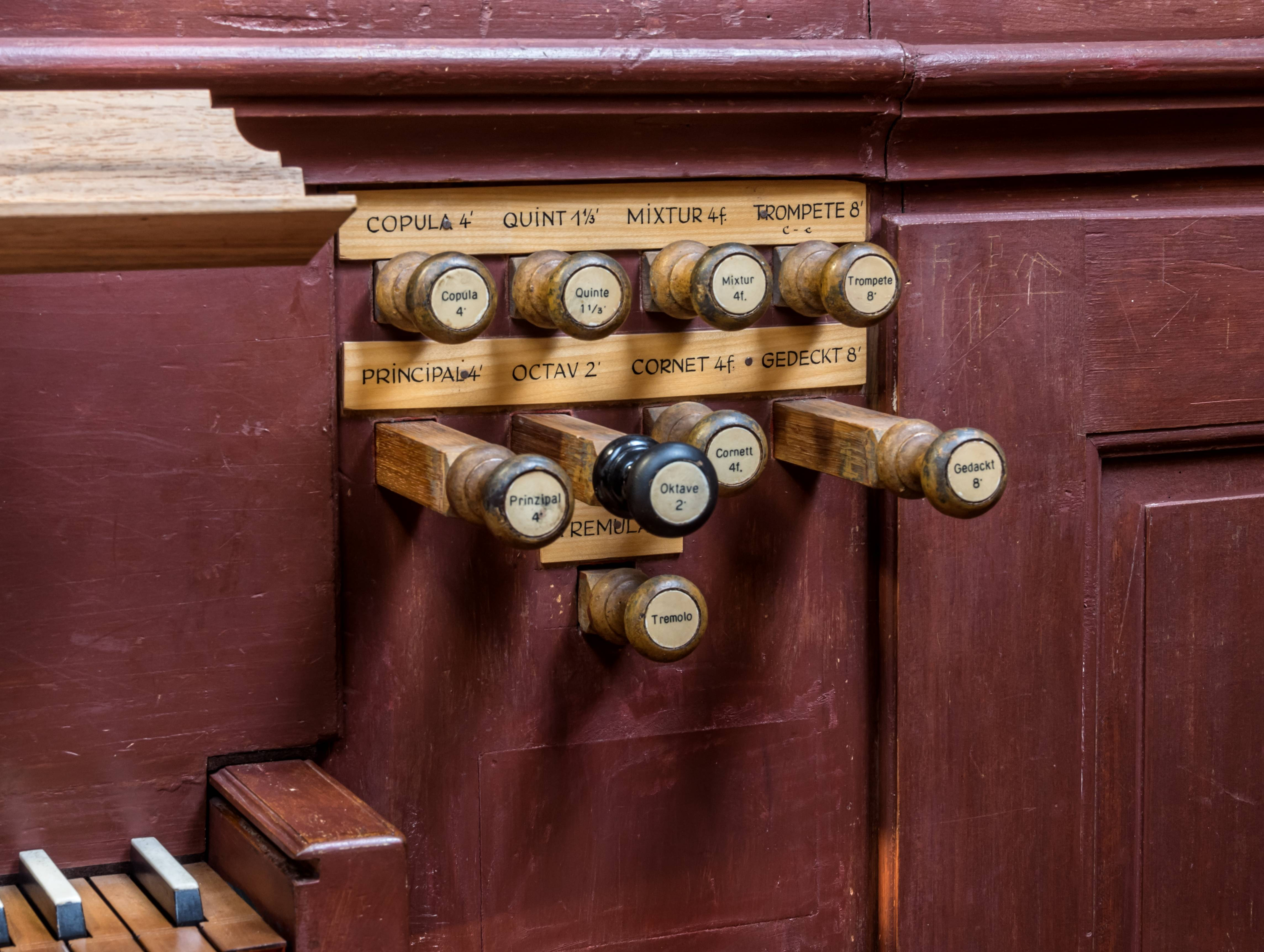 Bilder aus der evangelischen Kirche in Fischingen Die Orgel von Xaver Bernauer aus dem Jahre 1810 Die Register